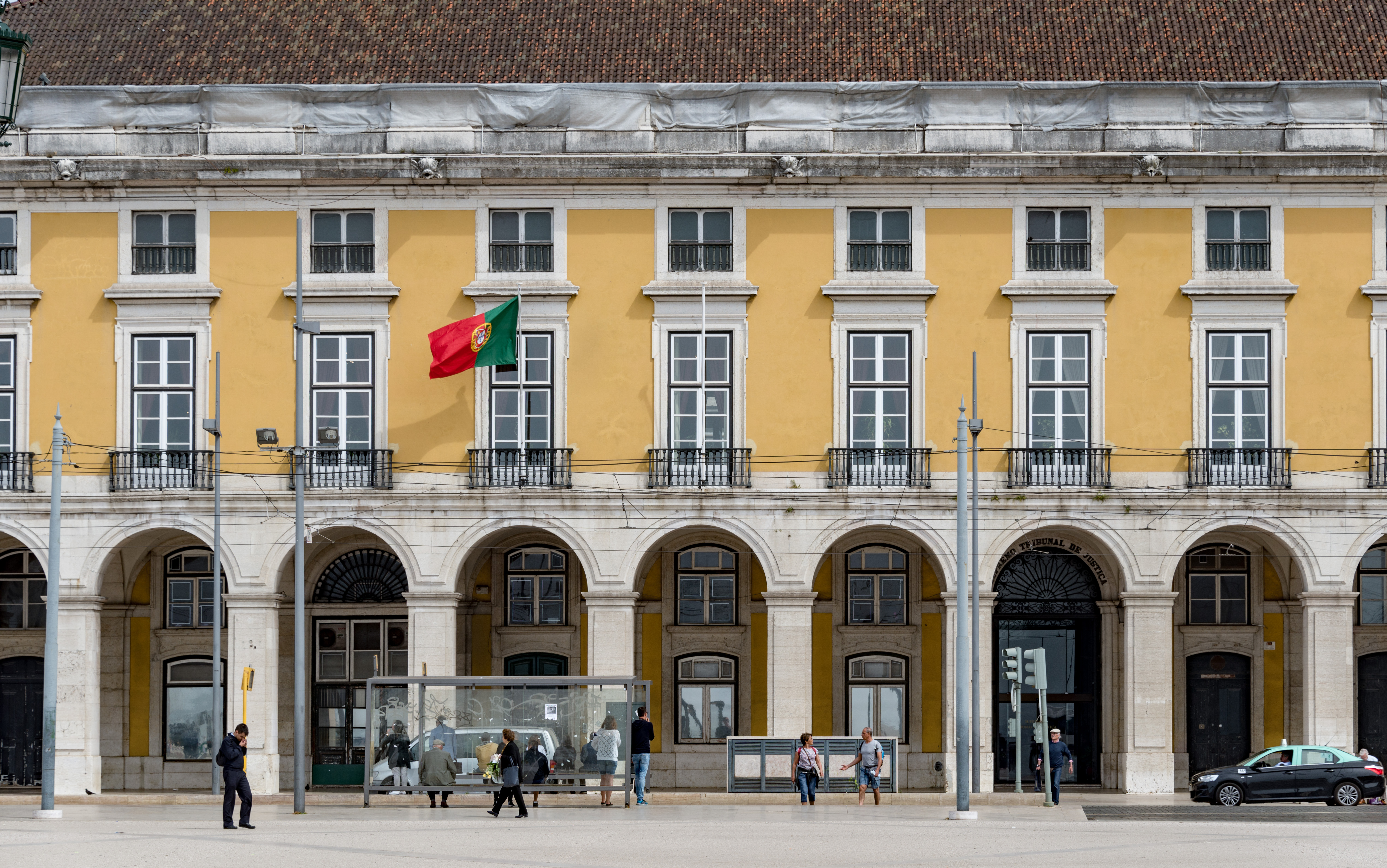 33833-Lisbon